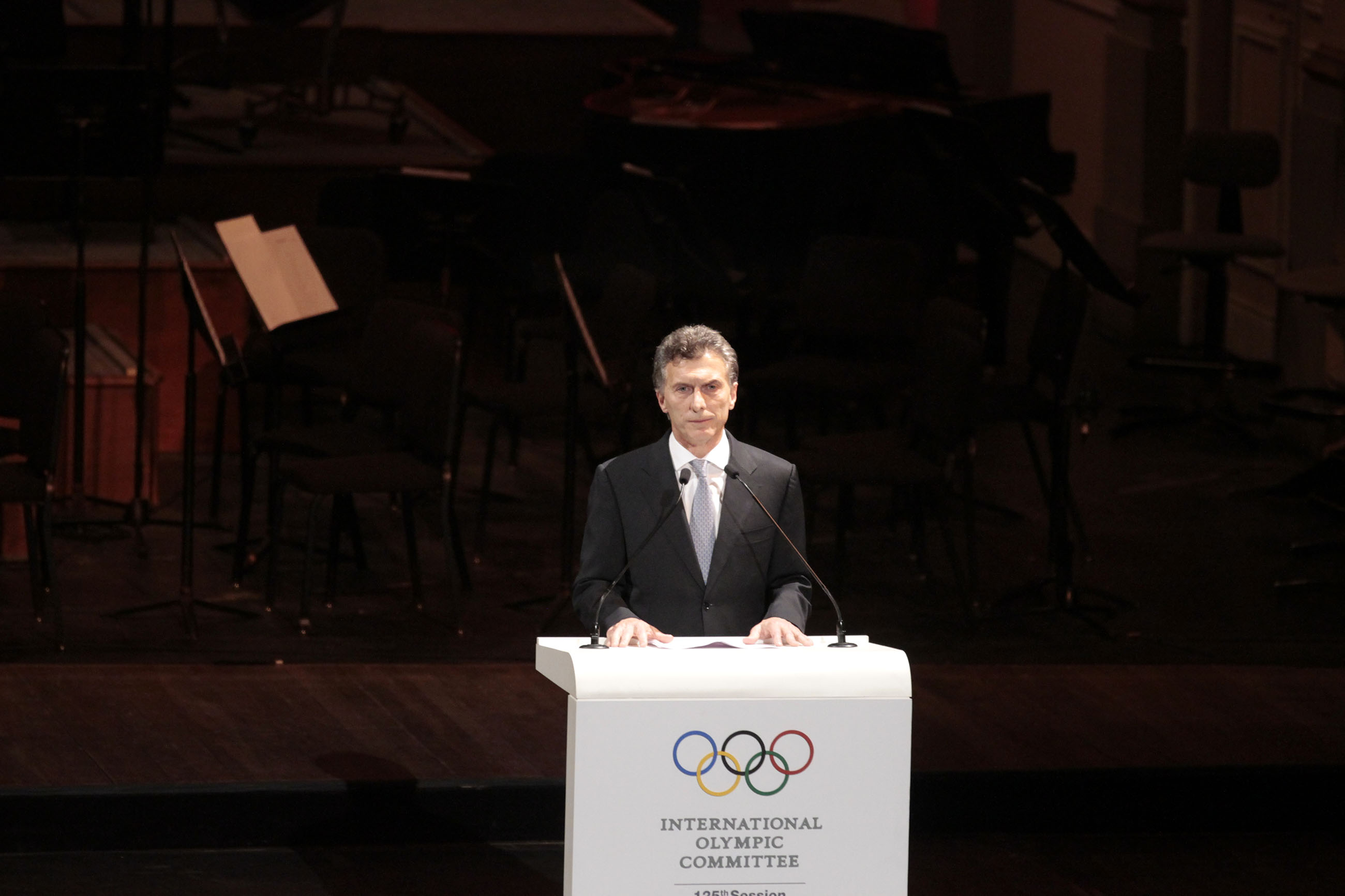 Buenos Aires. Setiembre 6 de 2013- El Jefe de Gobierno porteño, Mauricio Macri, fue anfitrión de la 125° Asamblea del COI realizada en el Teatro Colón. Foto Nahuel Padrevecchi-gv/GCBA.